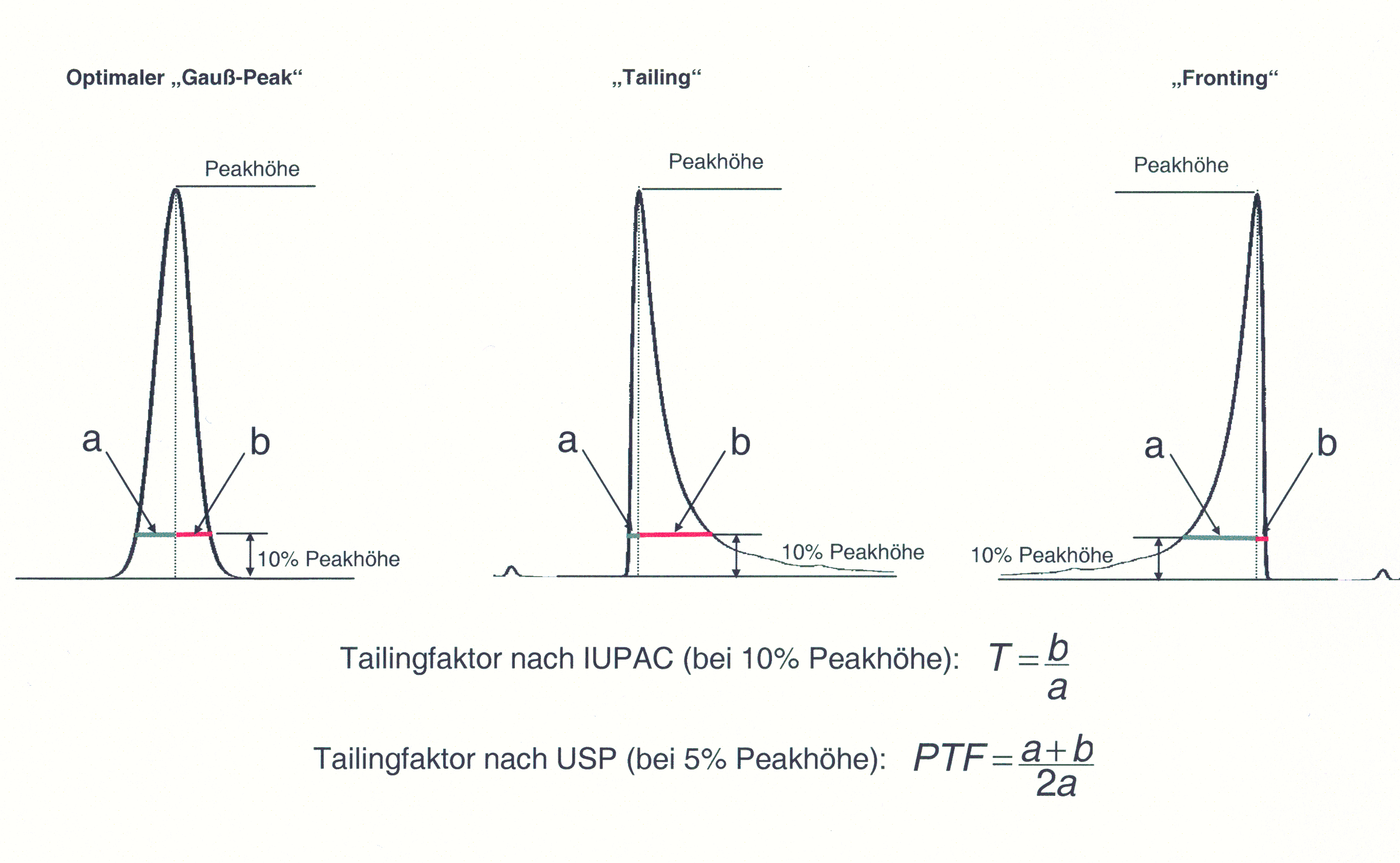 Gauß'scher Peak , Tailing , Fronting